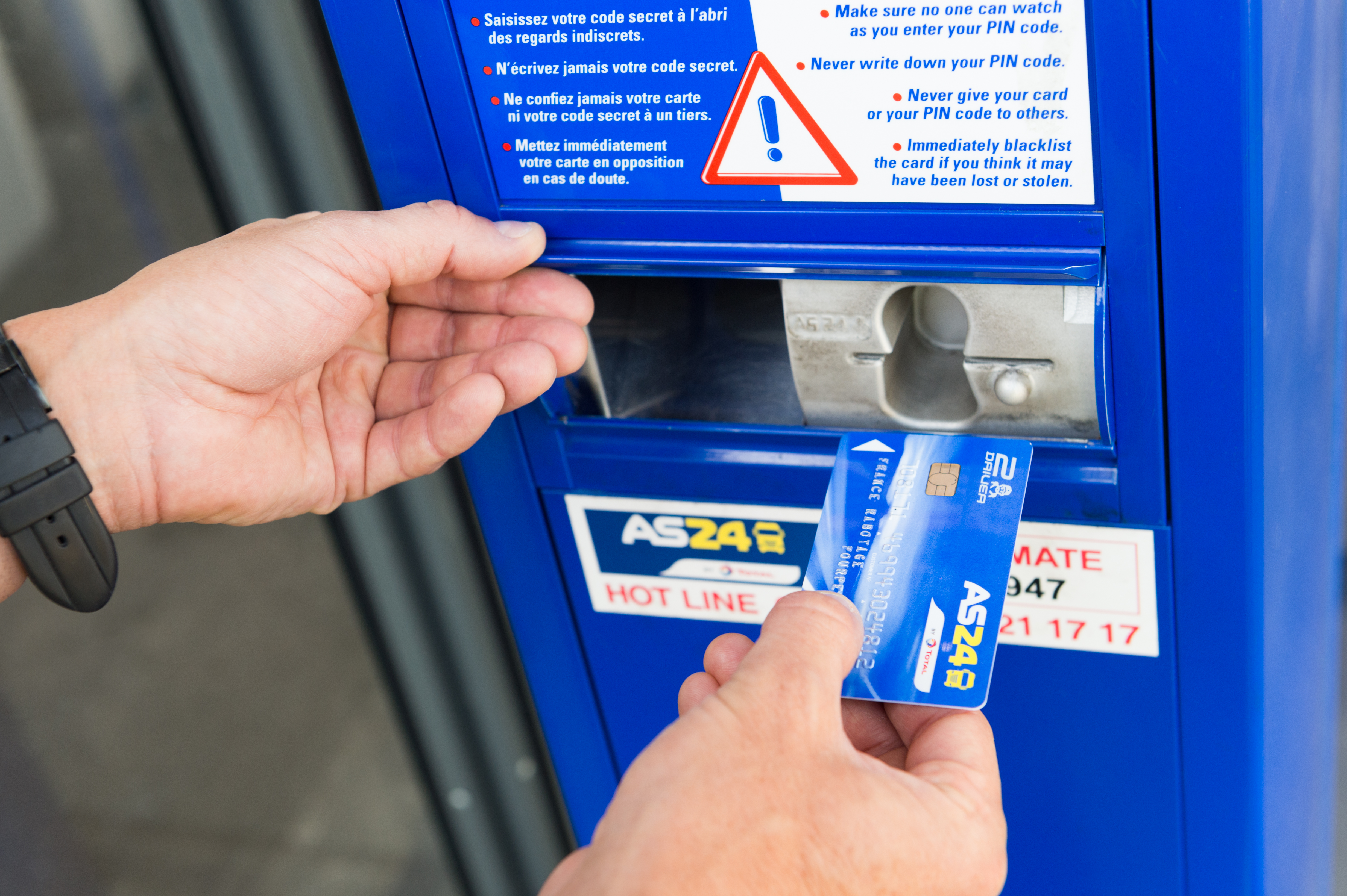 Carte AS 24